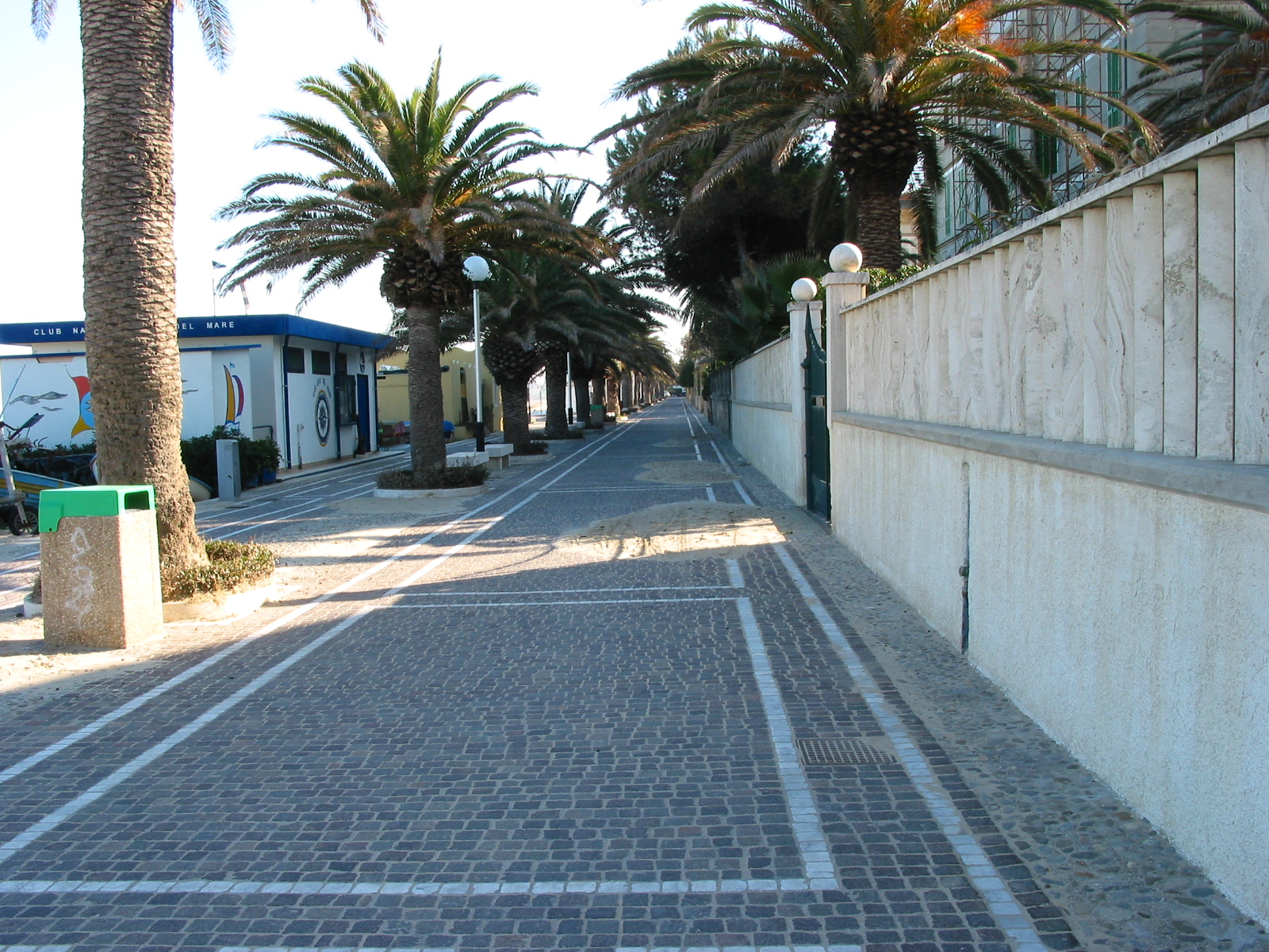 Grottammare - Lungomare Nord.